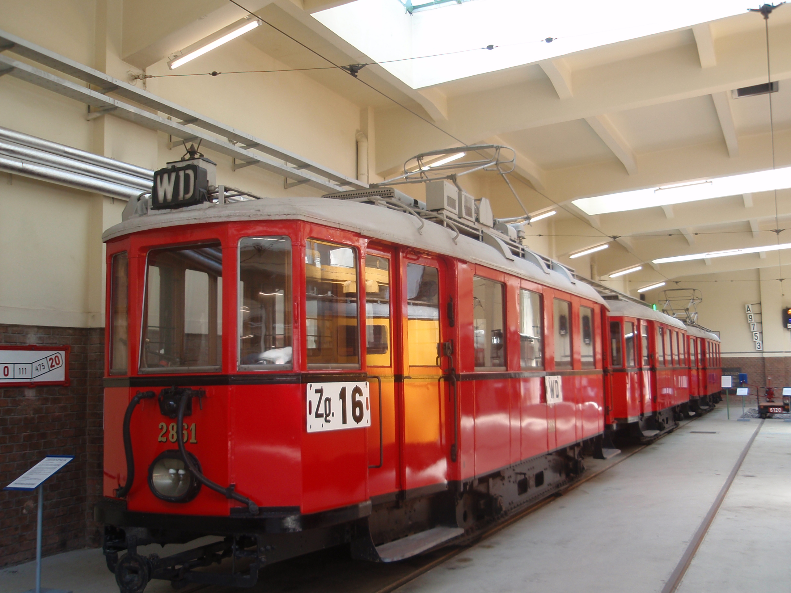 Historischer Stadtbahnzug der Type N im Wiener Straßenbahnmuseum